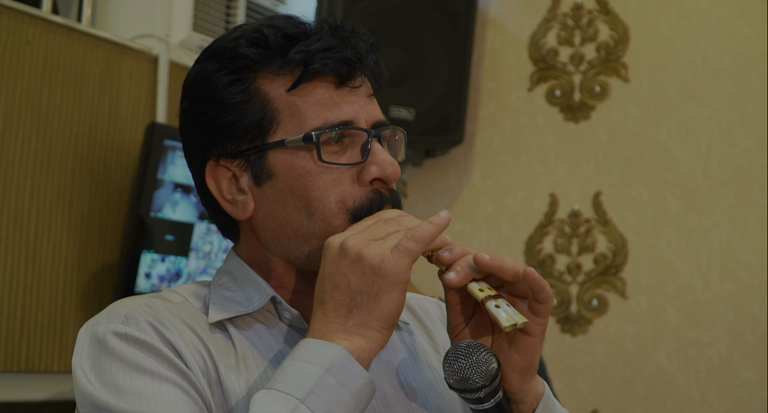 حسین صالح ابادی در حال نواختن قشمه